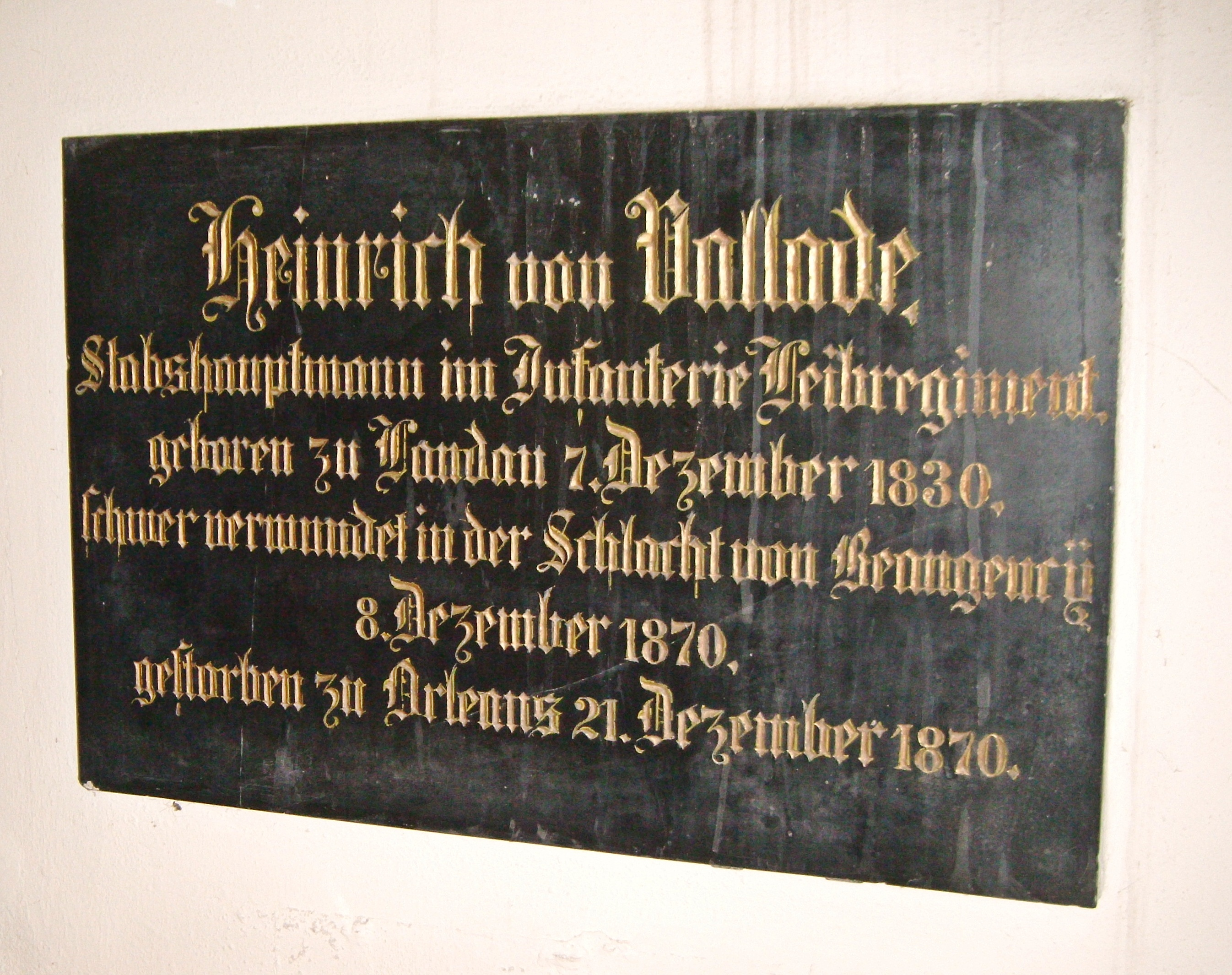 Heinrich von Vallade (1830-1870) Erzieher des Königs Ludwig III. von Bayern, Gedenktafel in der Stiftskirche Landau in der Pfalz